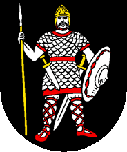 Wappen von Hätzingen Kanton Glarus Schweiz